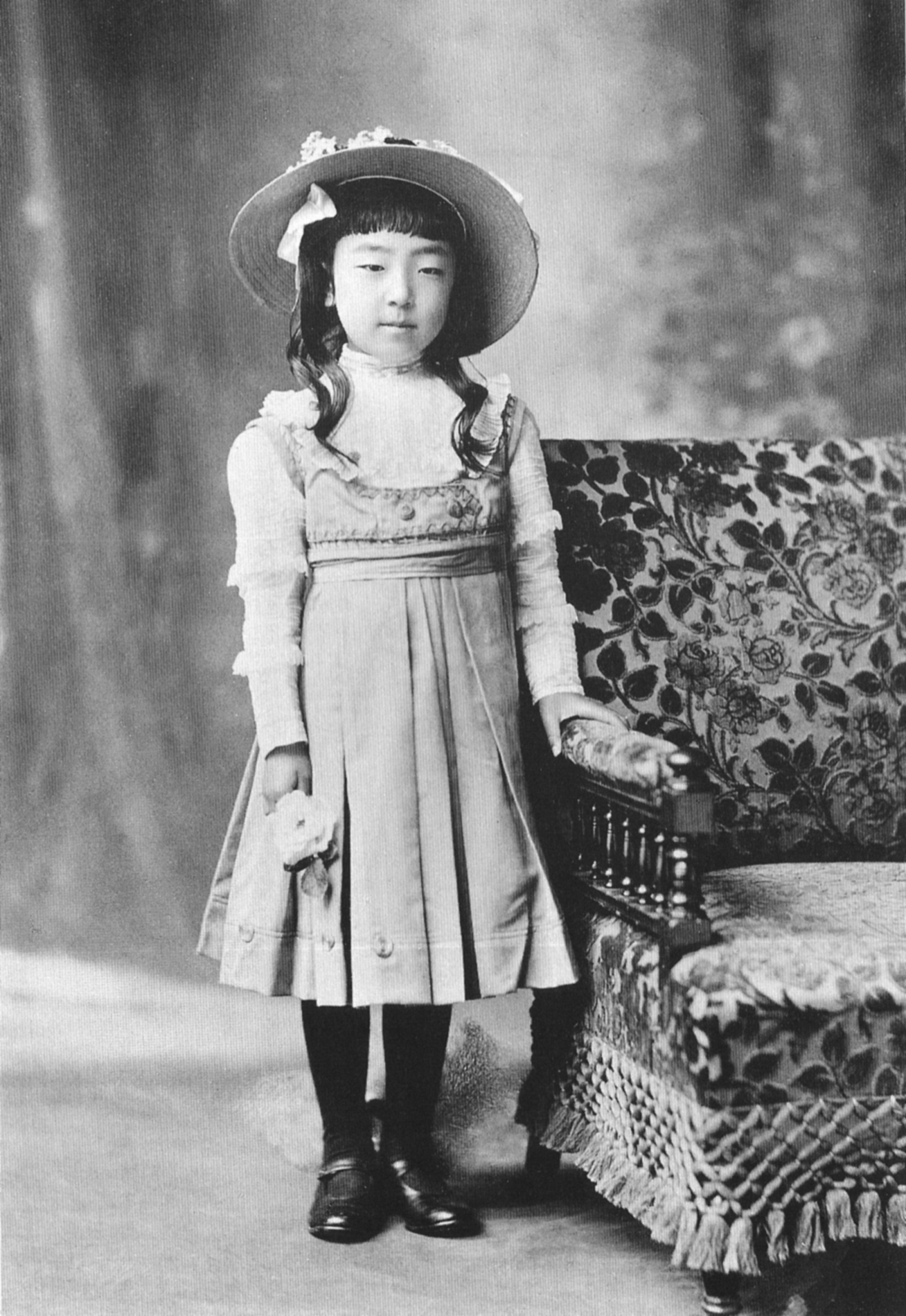 久邇宮良子女王（後の香淳皇后）。当時7歳(7 years old)。